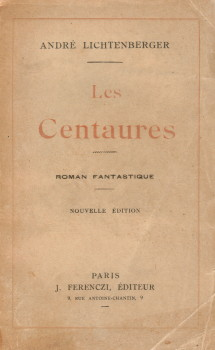 Couverture de la 2e édition du roman d'André Lichtenberger "Les Centaures", publiée chez Ferenczi en 1921 (la première édition du roman était parue chez Calmann-Lévy en 1904). On y voit la mention "Roman fantastique" qui ne figurait pas dans la première édition.